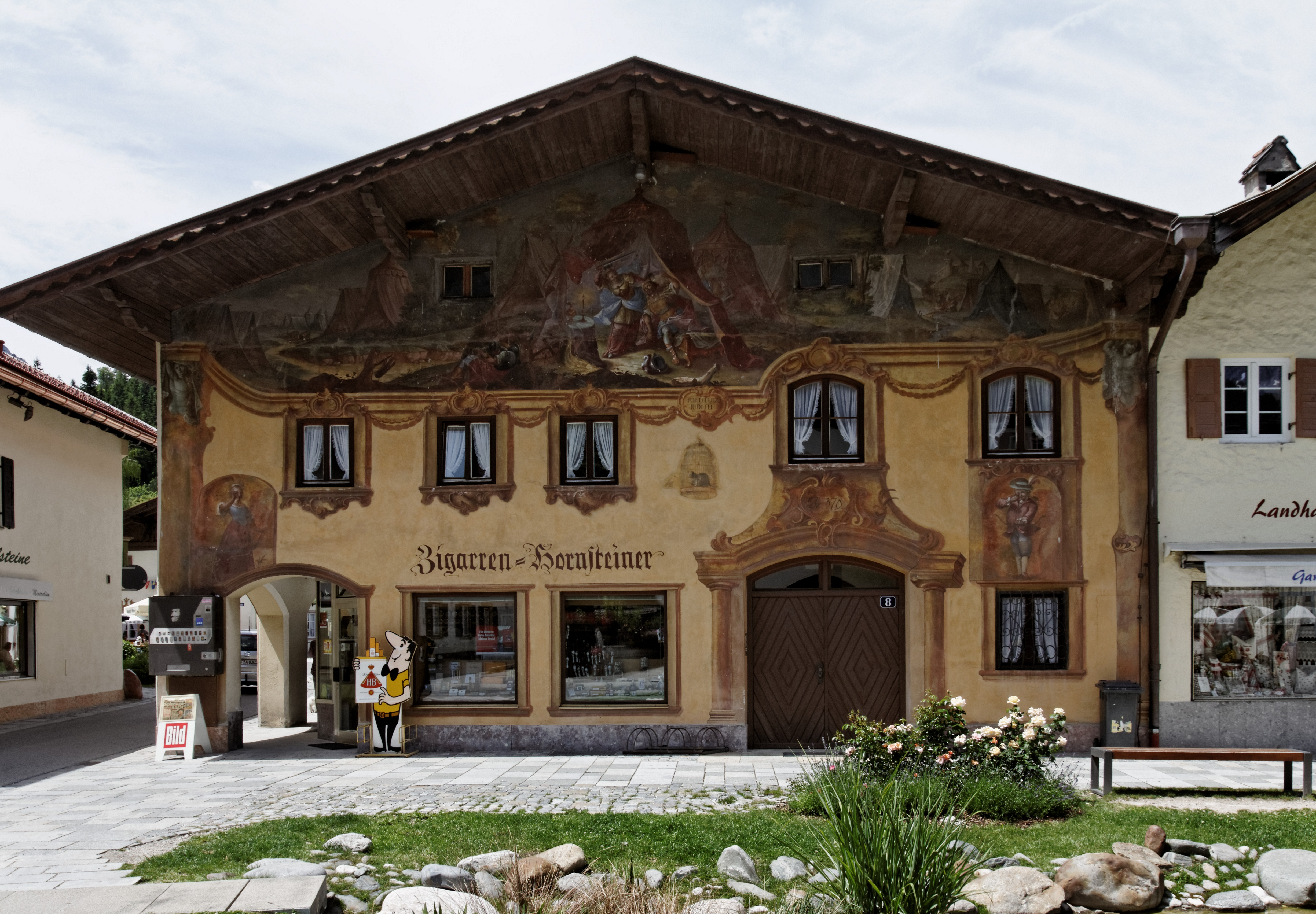 Mittenwald, Prof.-Schreyögg-Platz 6/8, Doppelhaus "Hornsteinerhaus"; Denkmalliste Mittenwald D-1-80-123-131